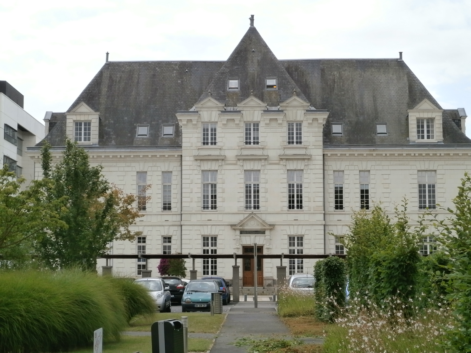 hôpital Bretonneau (Tours) administratif